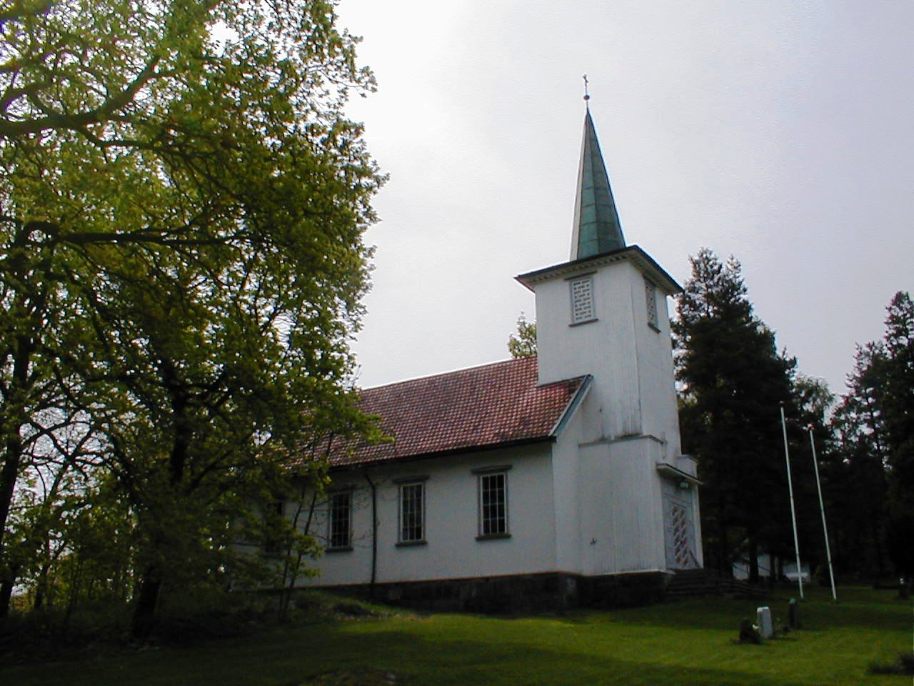 Veierland kirke, en langkirke fra 1905 i Nøtterøy kommune, Vestfold fylke, Norge.